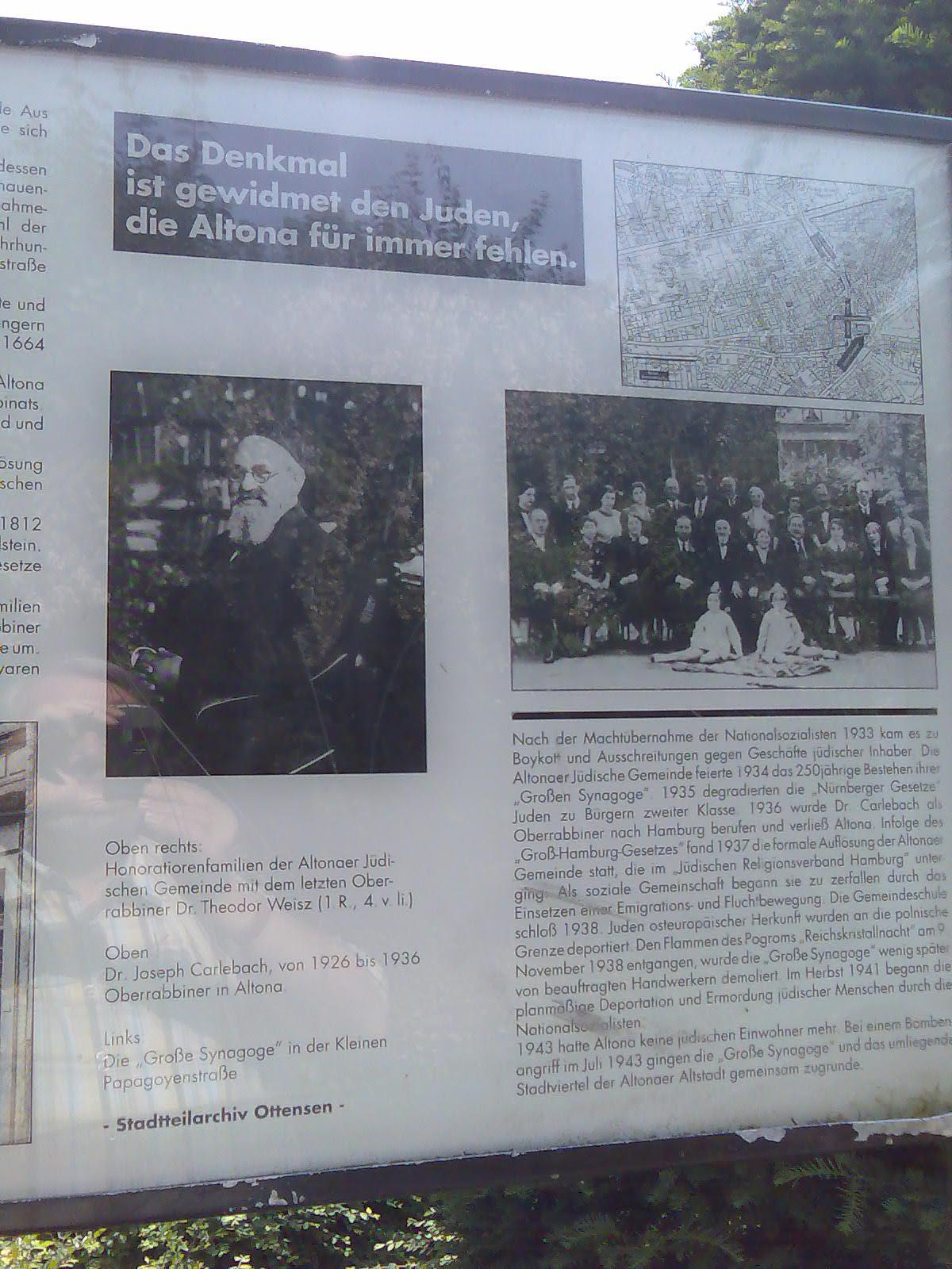 Gedenktafel für Altonas Juden